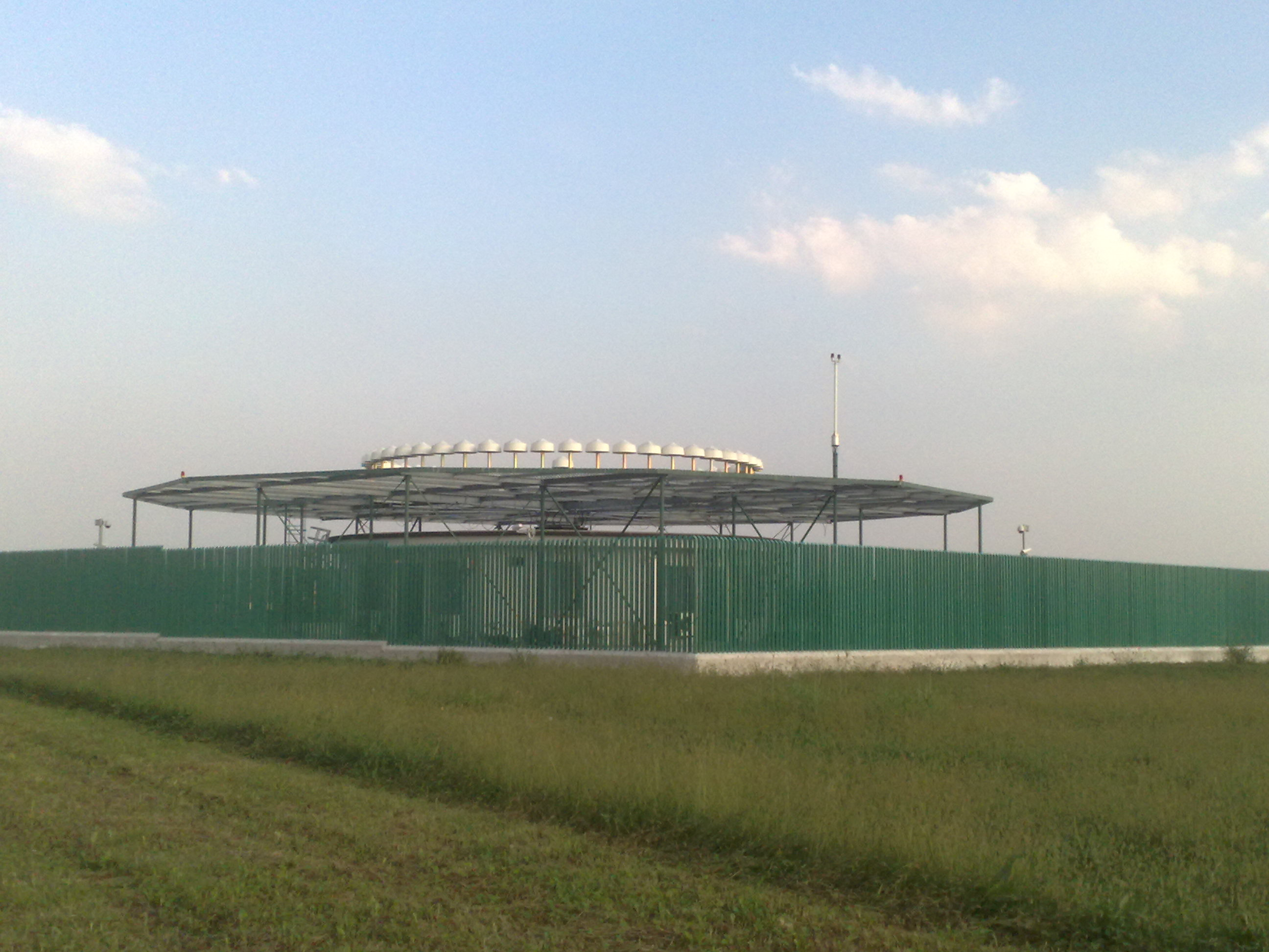 Antenna VOR Vicenza